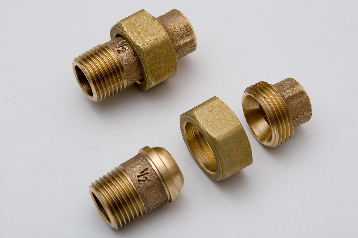 Lötfitting aus Rotguss vom Typ 4341g: Verschraubung mit Außengewinde und kegeliger Metalldichtung und Überwurf-Verschraubung